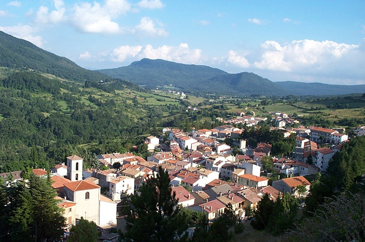 Panoramica di San Pietro Avellana